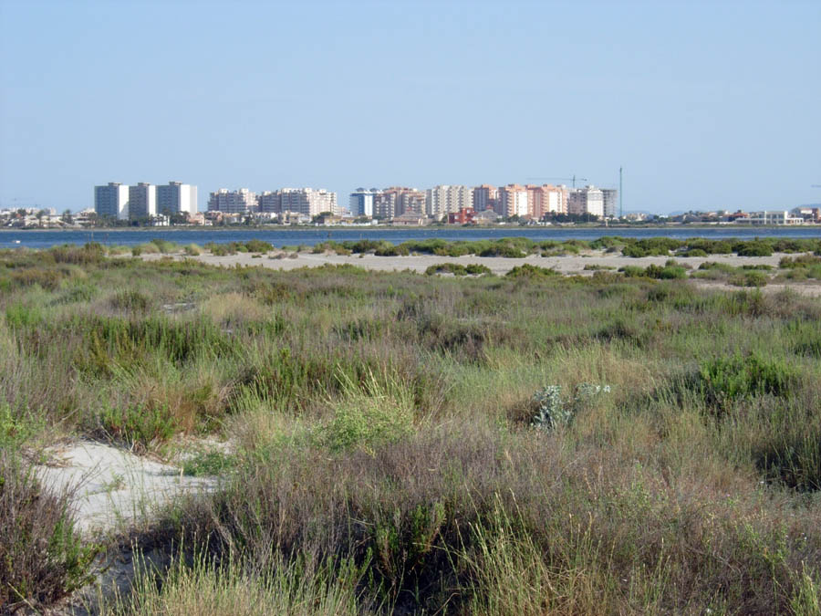 Vista desde el parque natural de San Pedro del Pinatar